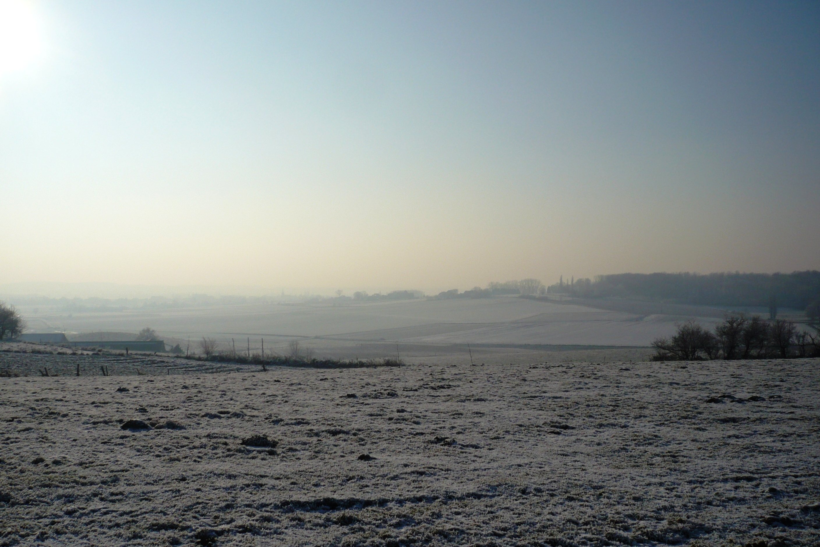 Paysage havinnois, à droite, le Bois de l'Allemont